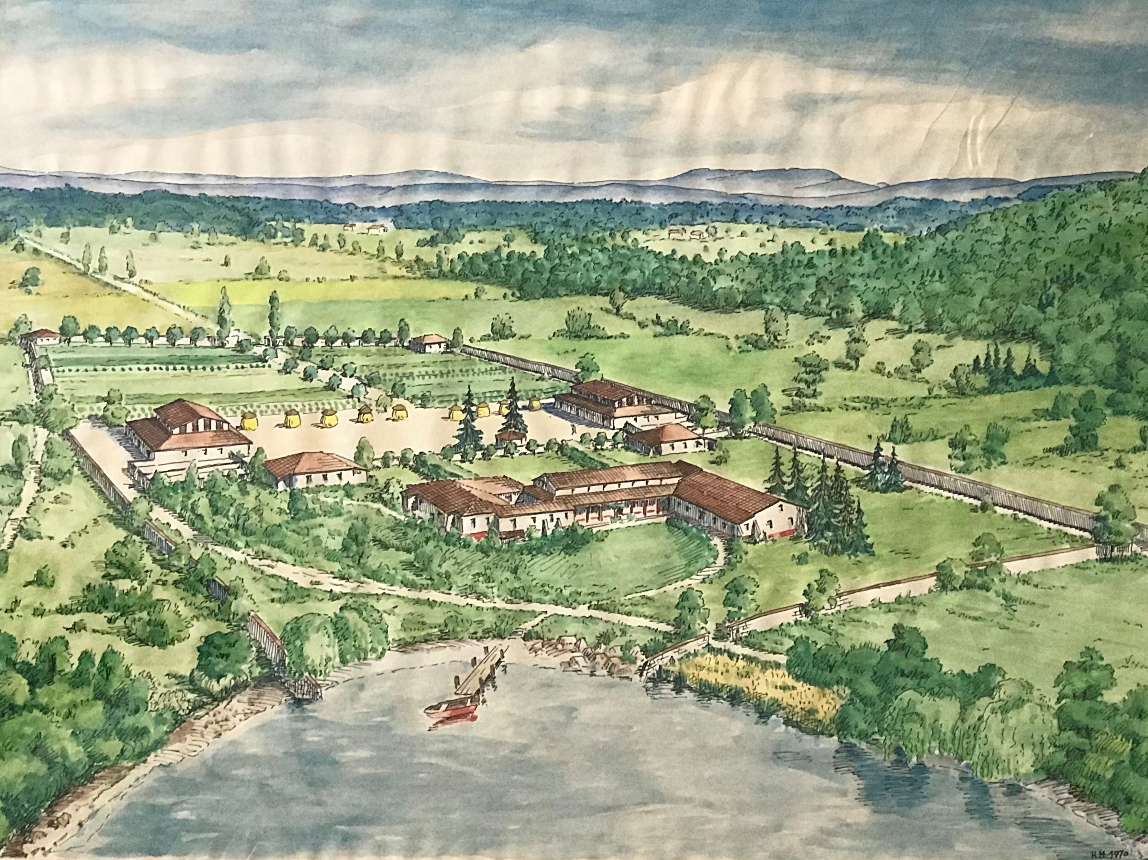 Römischer Gutshof Seeb, Rekonstruktion (Aquarell) von Hermann Meyer, Architekt